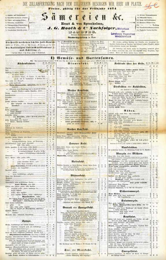 Versehen mit einem blauen Eigentümer-Stempel der „Bibliotheek der Landbouw Hogeschool, Wageningen“ wurde dieses offensichtlich beidseitig bedruckte Blatt durch das antiquariaat Jan Meemelink im Jahr 2016 für 160,-- Euro angeboten. Es ist die Preisliste des Samenzüchters „Ernst & von Spreckelsen J. G. Booth & Co. Nachfolger“ mit Sitz in der Große Reichenstraße 11' in Hamburg, der - ebenfalls in der Hansestadt - mindestens einen eigenen Samengarten unterhielt ...